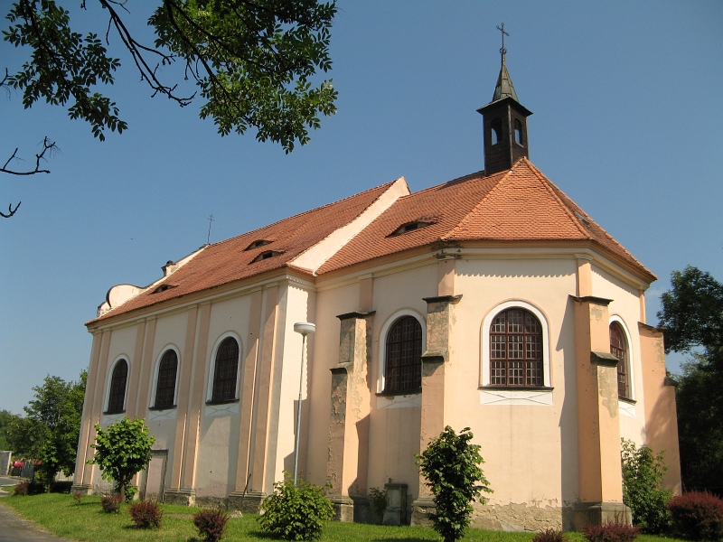 Kostel svatého Martina, Lipová, Lipová (Chuderov).